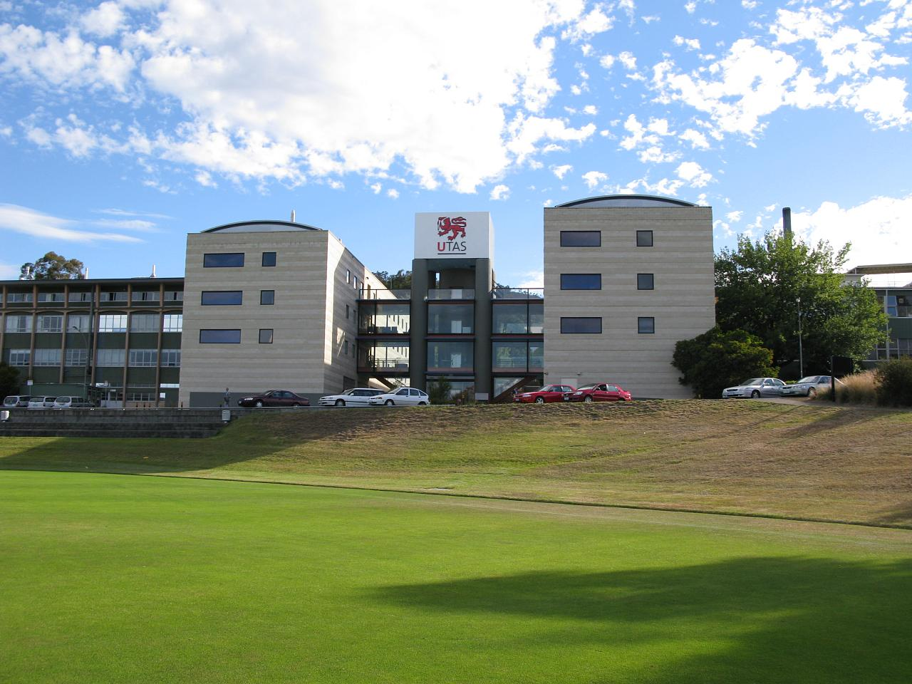 LCA 2009 Venue